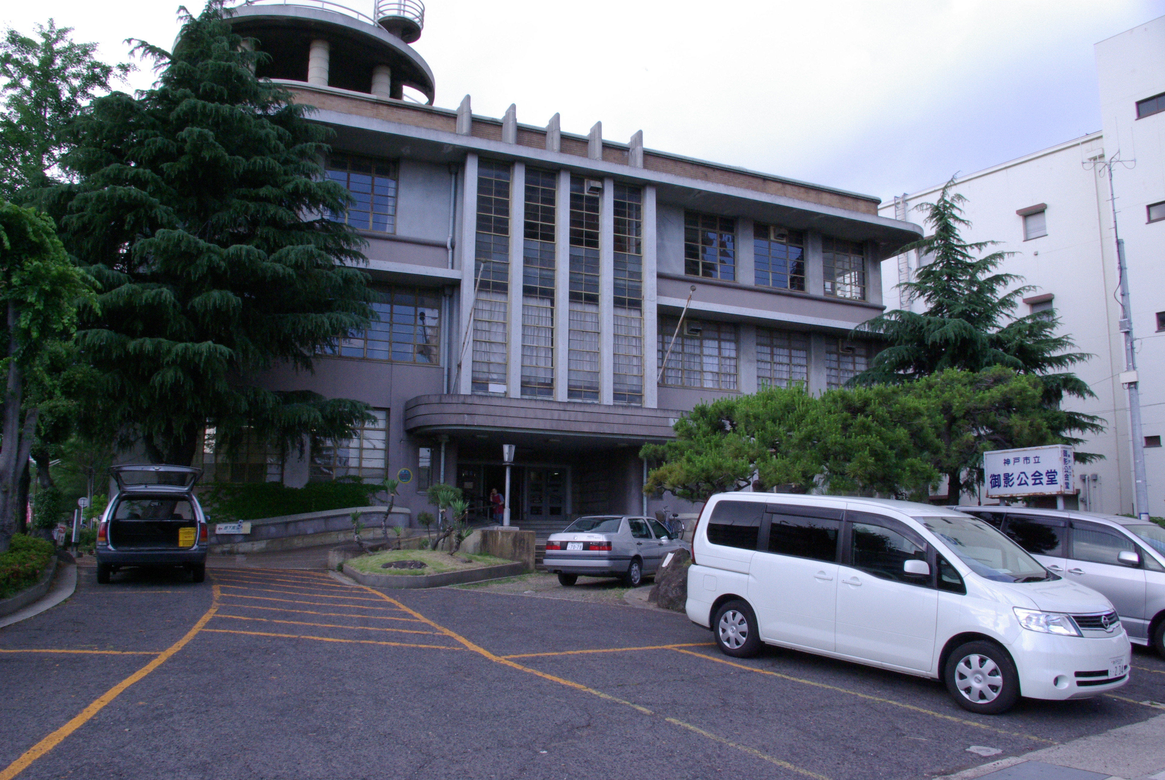 Mikage PublicHall(Mikage, EastNada, Kobe, Hyogo, Japan)